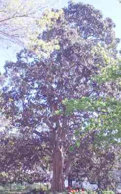 Figuier de Port Jackson